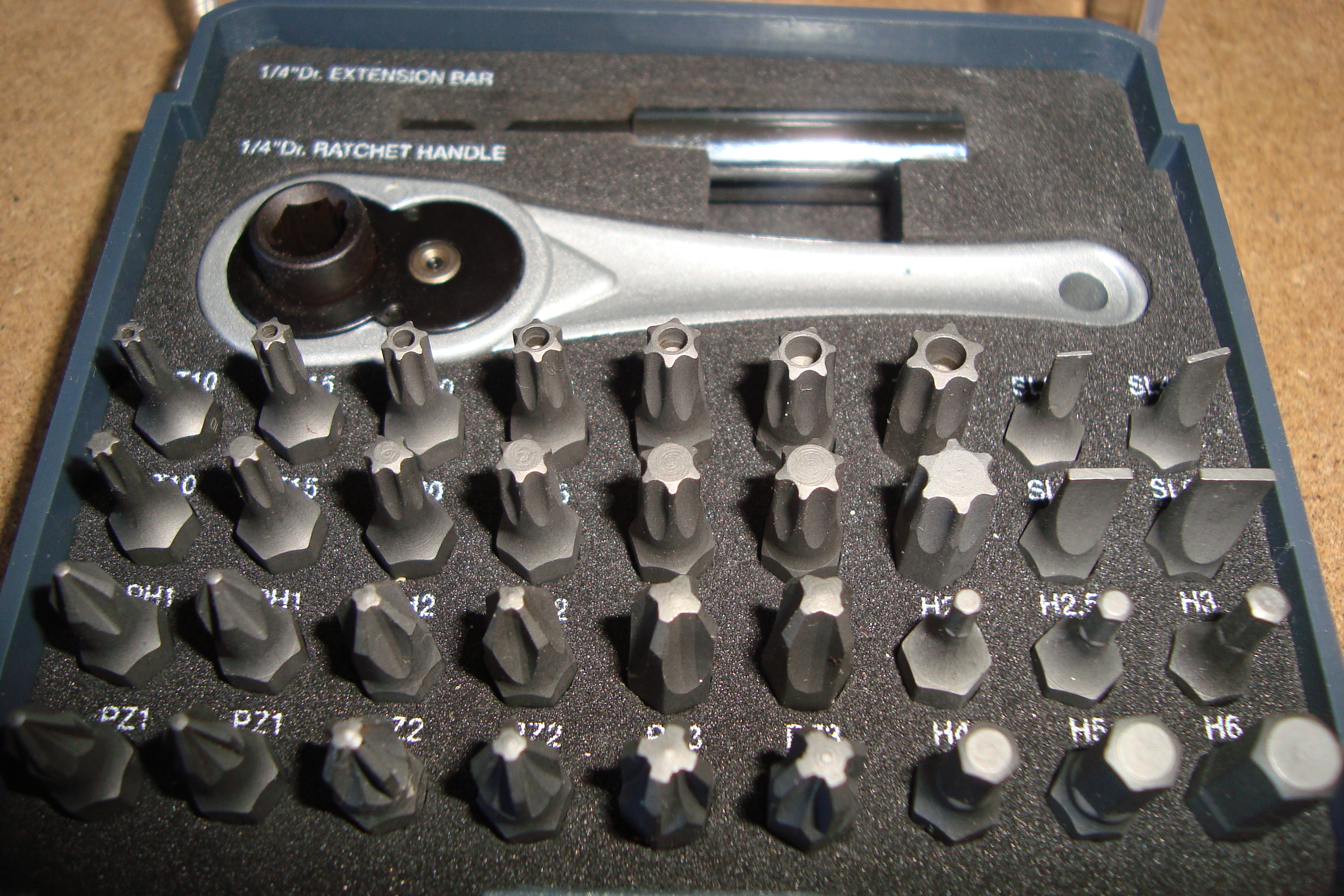 Простой набор инструментальных бит, с удлинителем 1 1/4" и ручной «трещёткой».